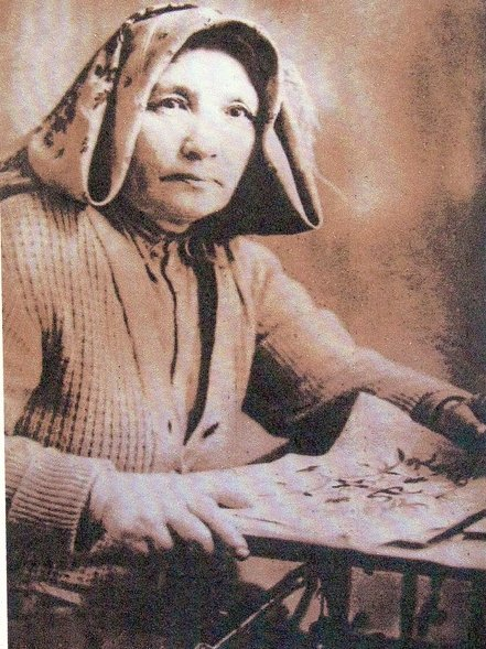 Адавіє Ефендієва (1935 рік)